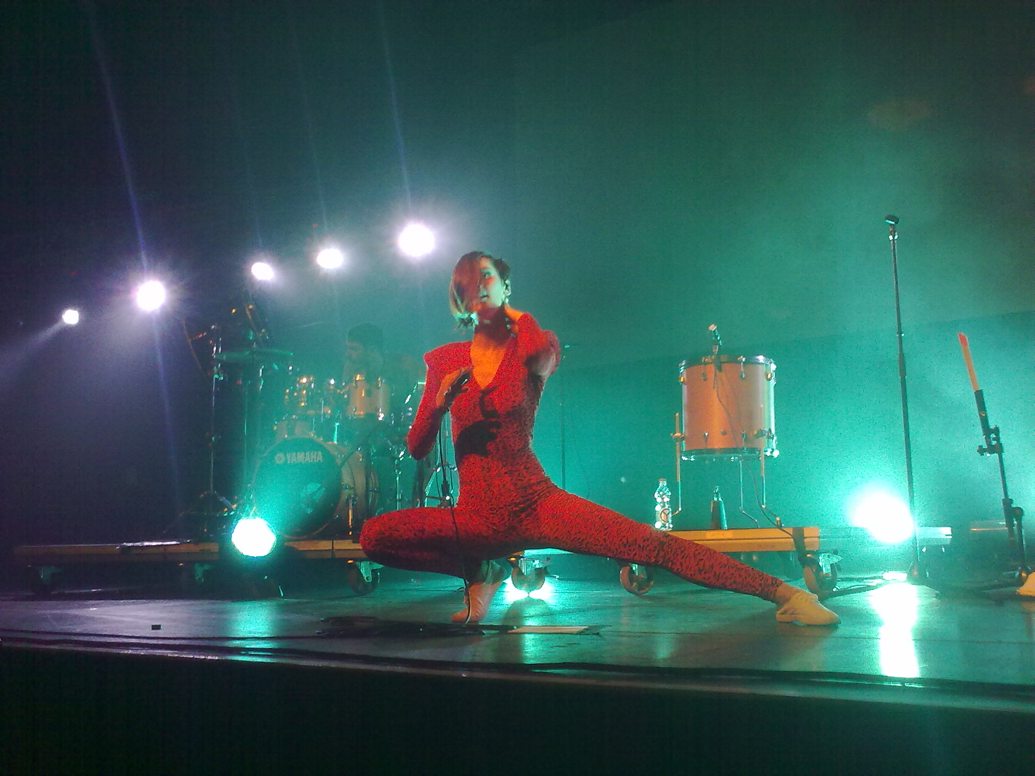 Yelle mit Band, beim Springfestival 2011in der Stadthalle Graz